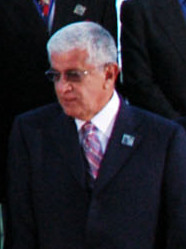 Alfredo Palacio, President of Ecuador, during the 4th Summit of the Americas (Cumbre de las Américas). November 4th, 2005.